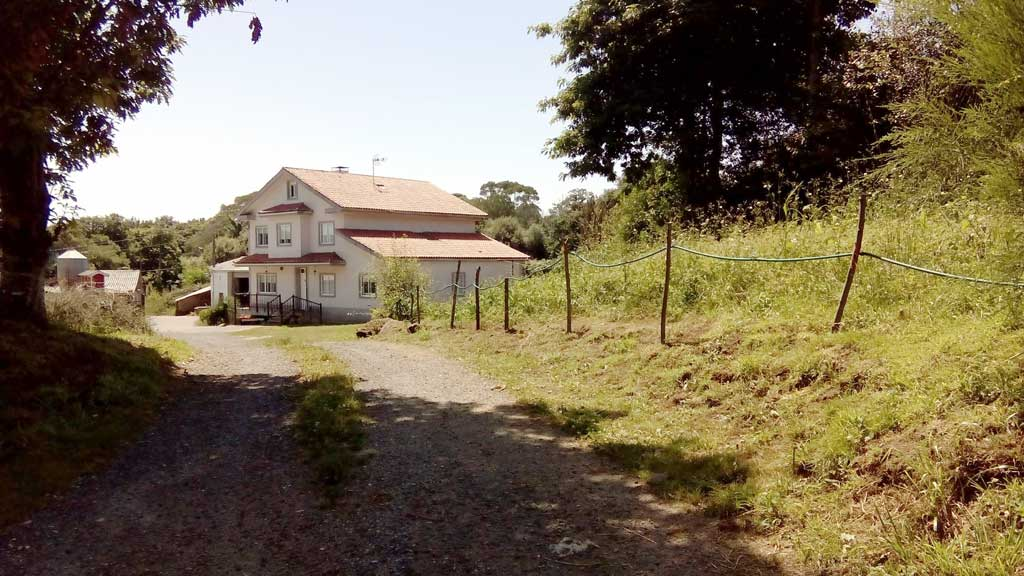 Vista dos Martiños, Curtis.